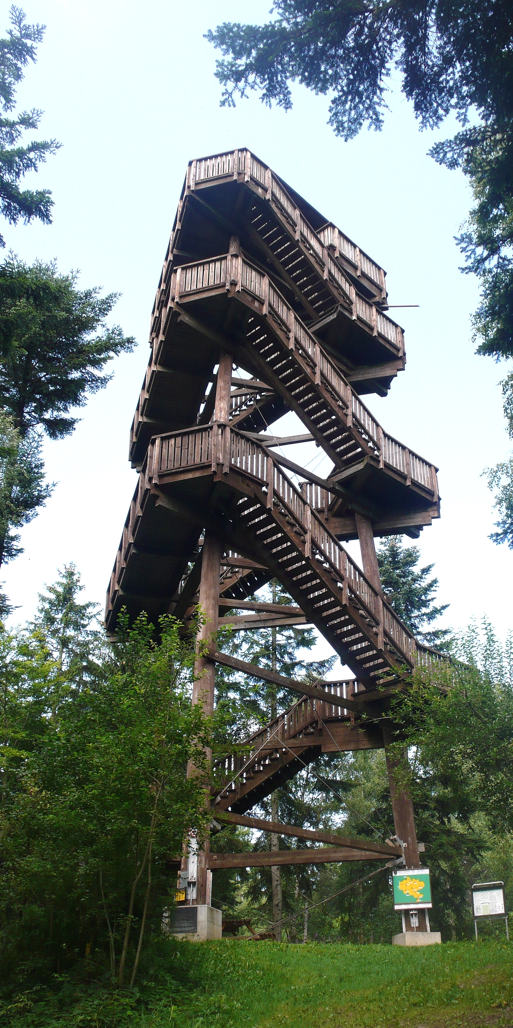 "Viele kleine Leute, die in vielen kleinen Orten viele kleine Dinge tun, verändern das Leben auf der Welt!" Aubergwarte in Niederösterreich